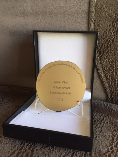 Médaille de sociétaire définitif de la SACEM remise à Mario VIlas en 2018.